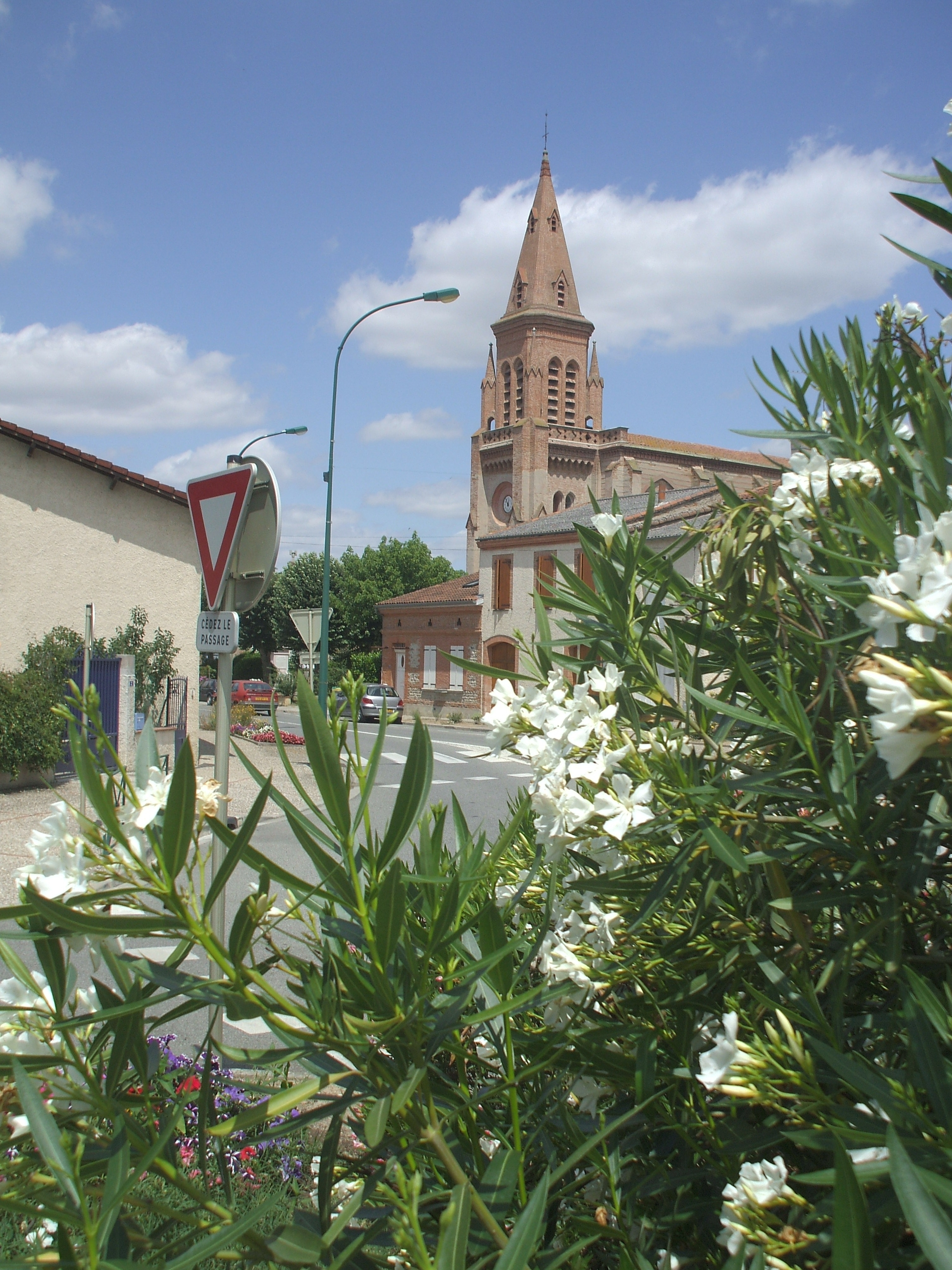 Grépiac (Haute-Garonne, France) - Église Saint-Martin.